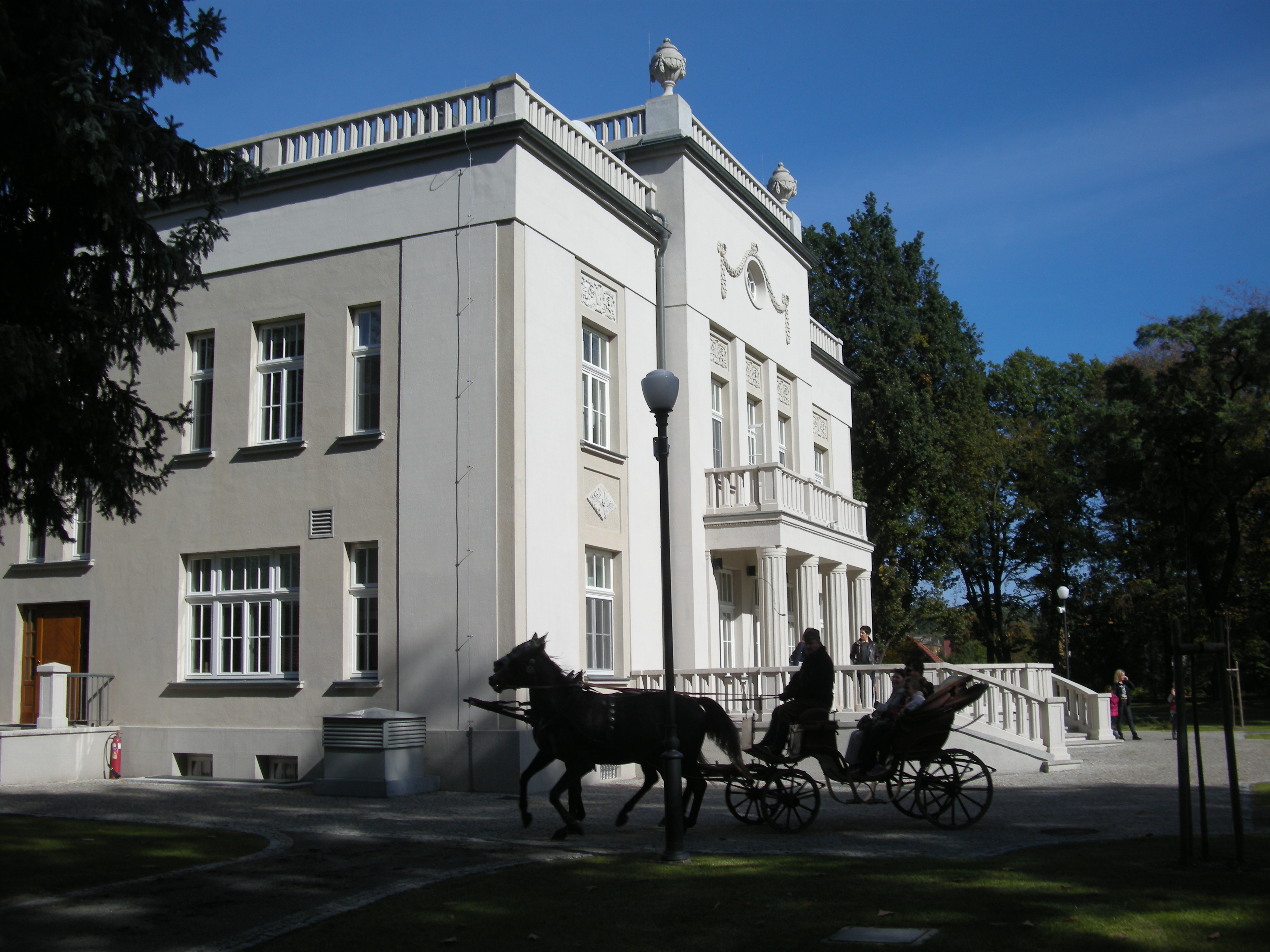 Dyrektorówka w Tarnowie-Mościcach